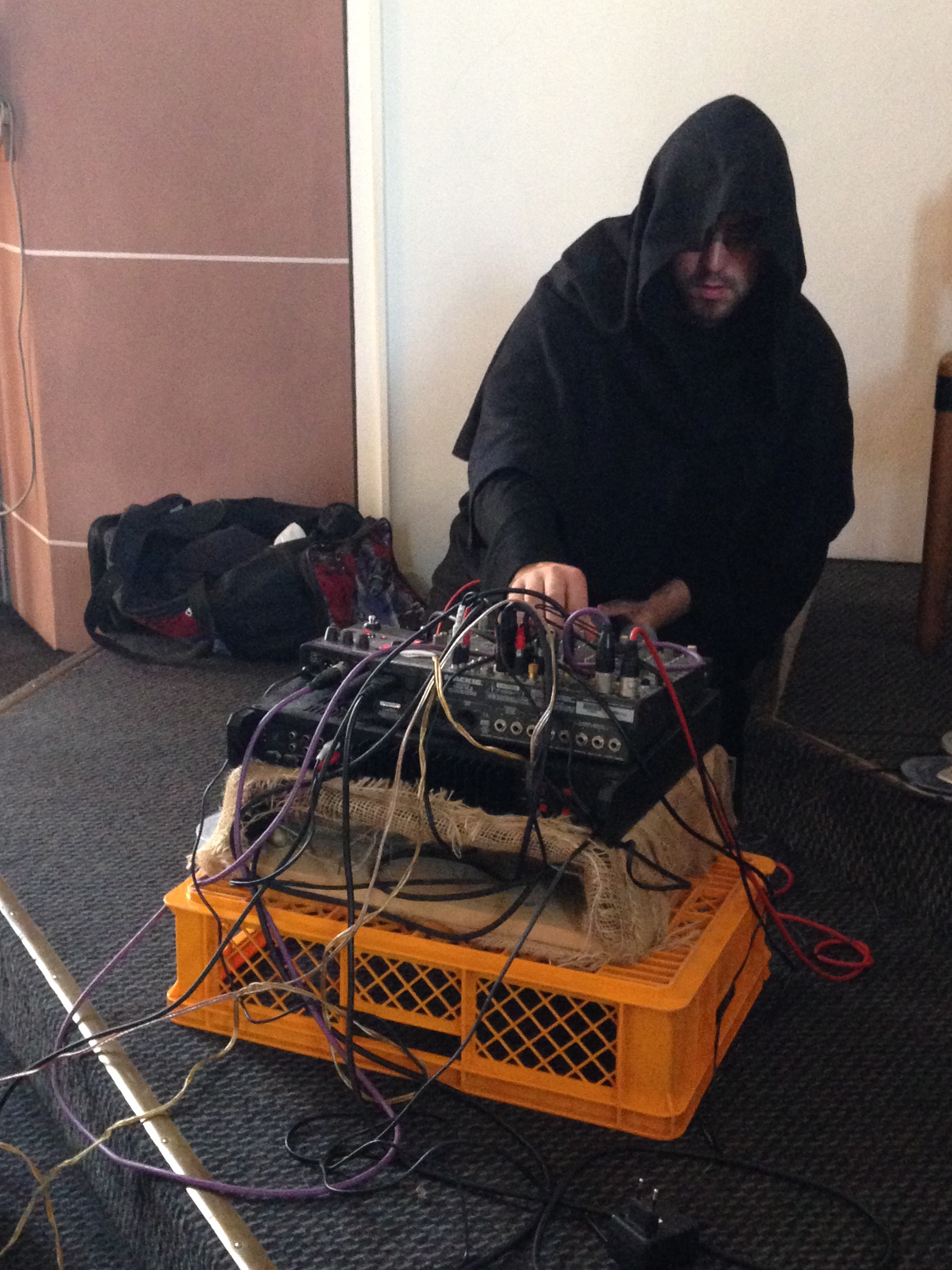 Klangkünstler Ketonge in Aktion im Kostüm von Georg Herold Köln 2015